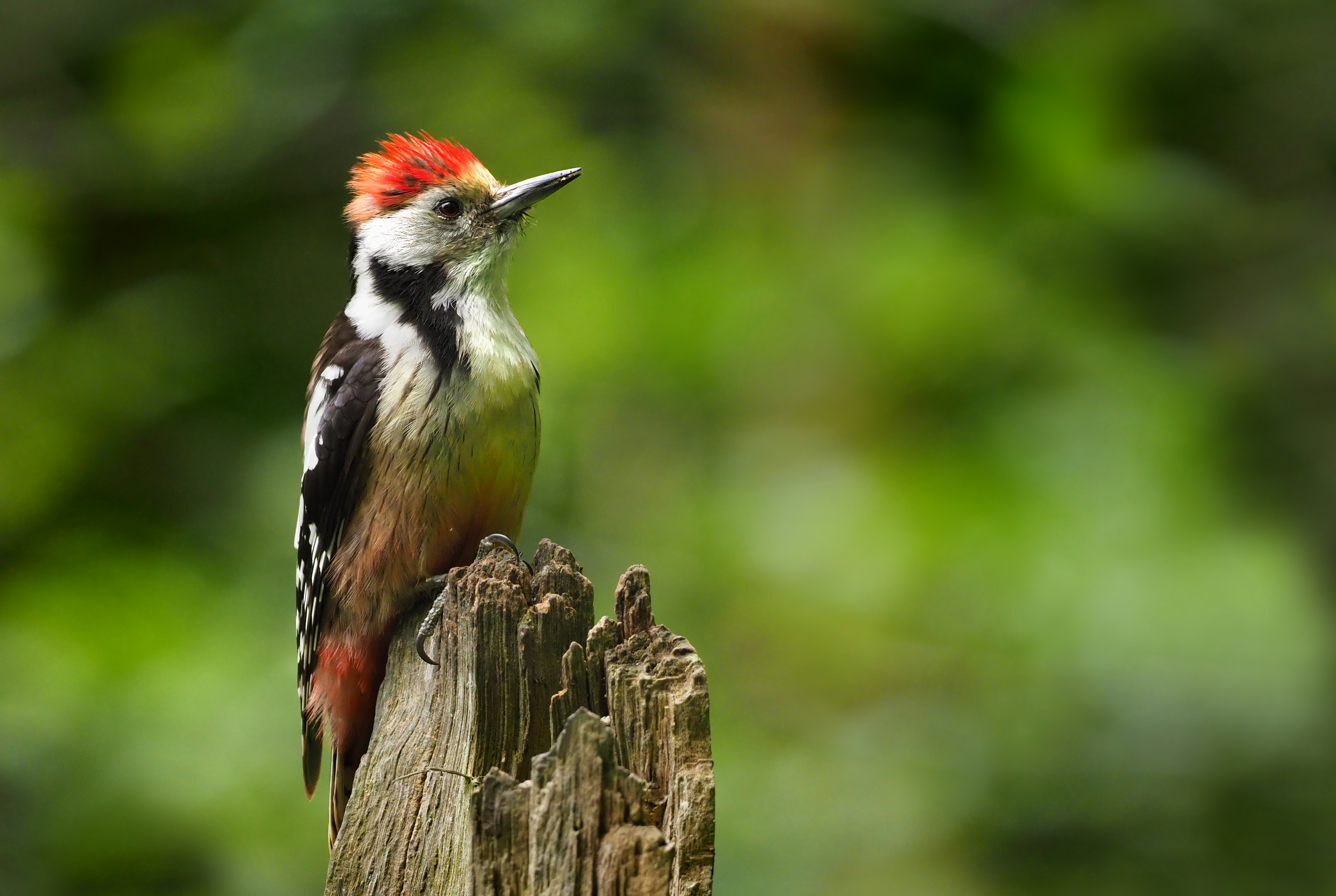 Middle-Spotted Woodpecker (Dendrocopus medius), Forêt de Soignes, Brussels